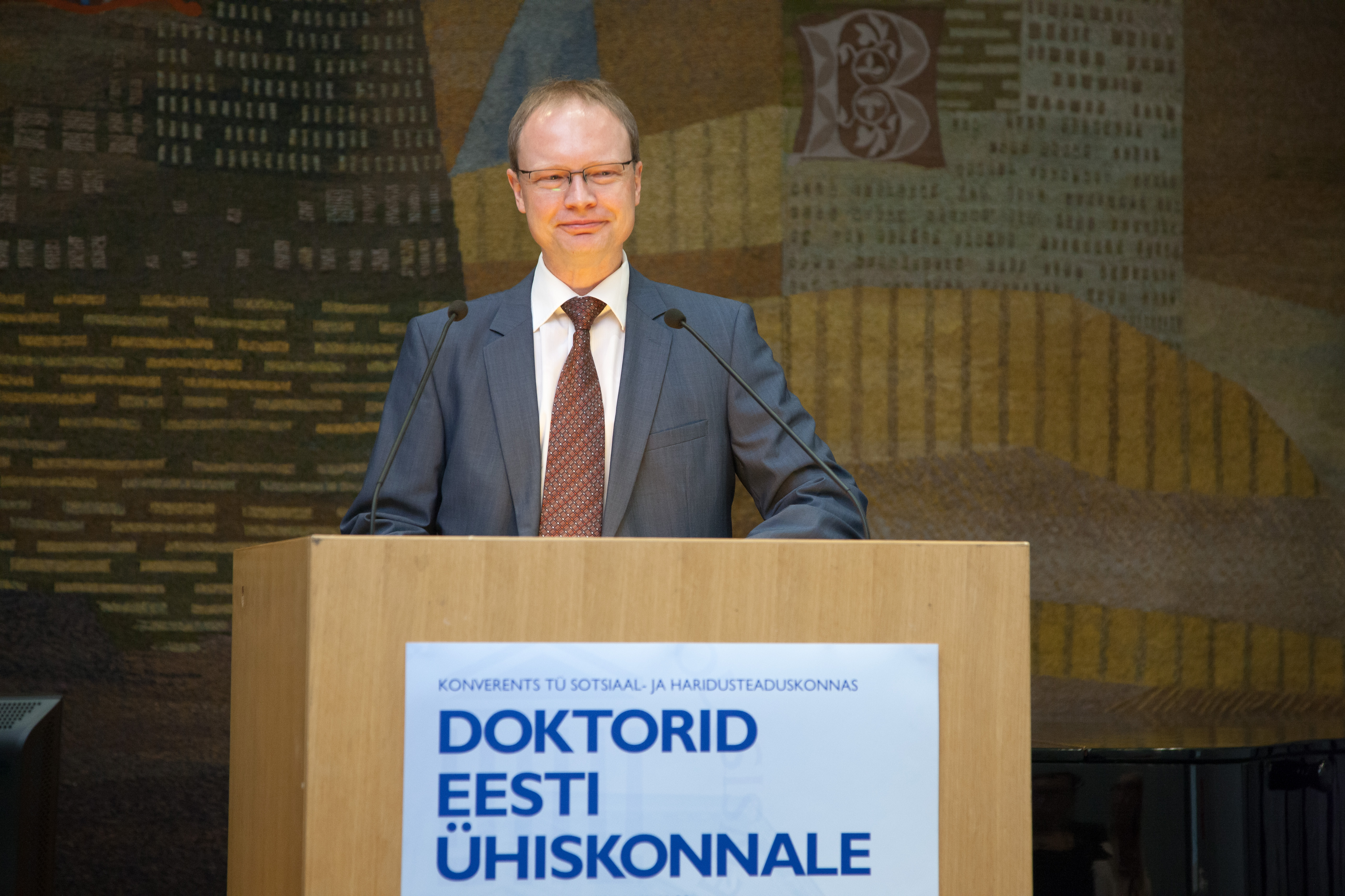 Sotsiaal- ja haridusteaduskonna 20. aastapäeva konverents "Doktorid Eesti ühiskonnale" TÜ raamatukogu konverentsisaalis 4. oktoobril 2012. Konverentsi avab Sotsiaal- ja haridusteaduskonna dekaan prof Jaanus Harro.